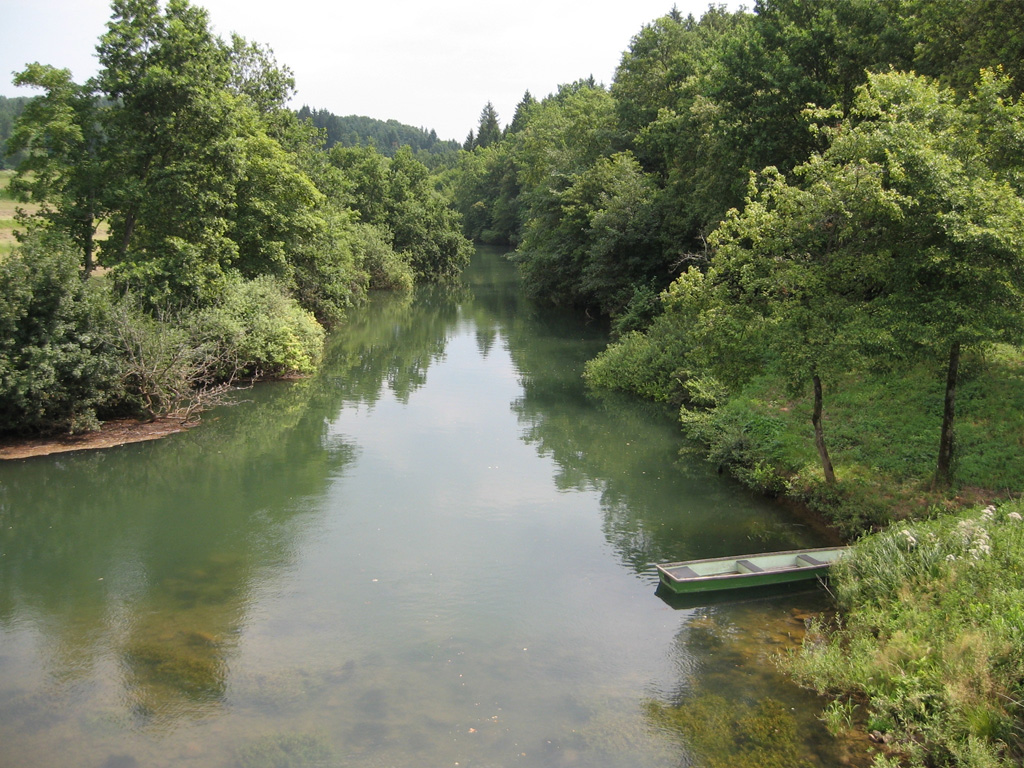 Reka Lahinja/ River Lahinja